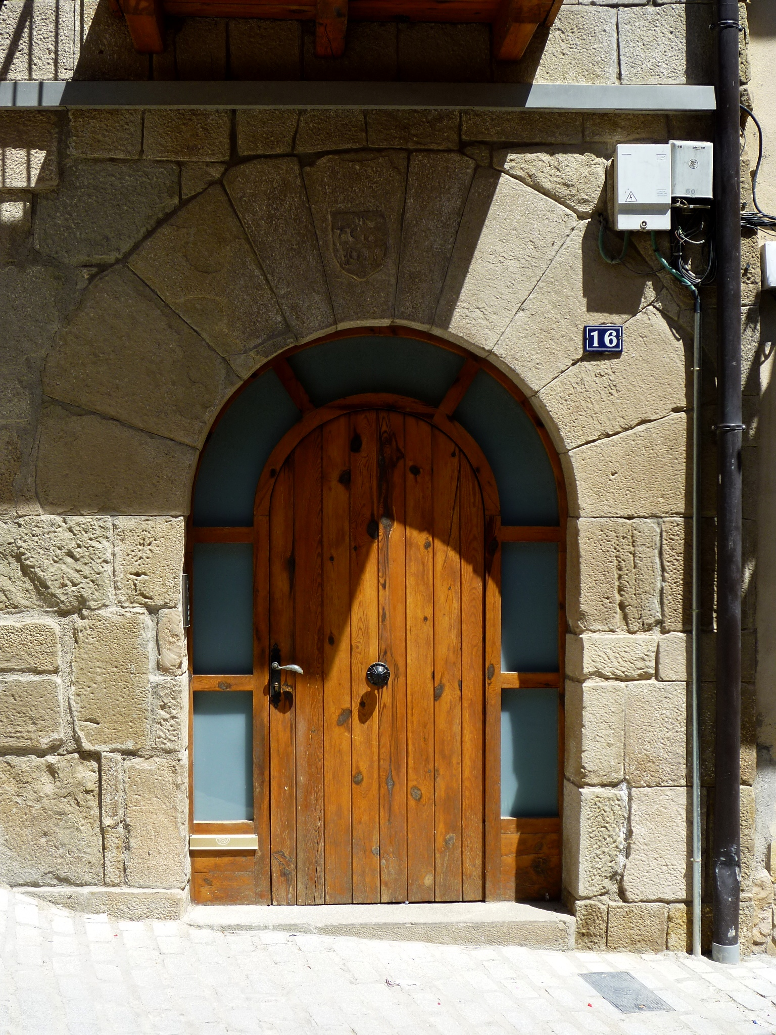 Cal Comabella (Artesa de Segre): portal